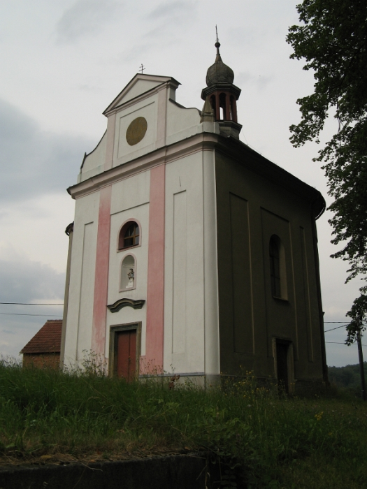 Kaple svatého Jana Nepomuckého, Opatov (okres Svitavy).